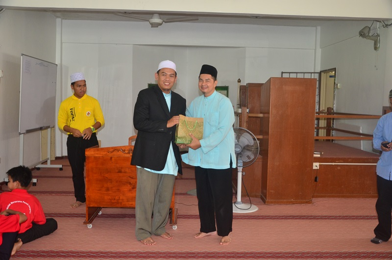 Tuan Haji Tolhah Bin Ramli, Penolong Kanan Hal Ehwal Murid SEPINTAR memberikan cenderamata kenang-kenangan kepada Ustaz Hadi atas ceramah yang disampaikan di Masjid Al-Qadisiah pada 15 Mei 2016